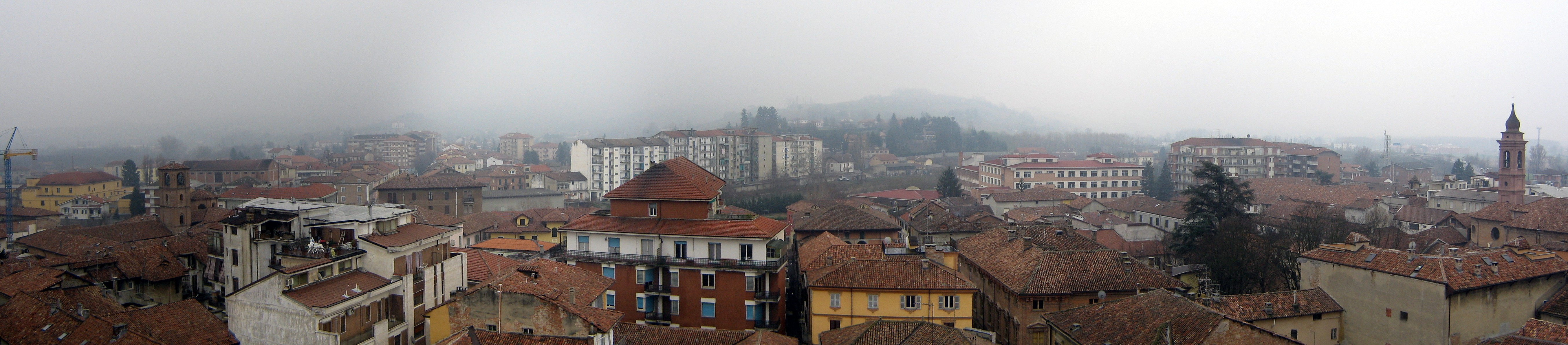 Panorama di Nizza Monferrato verso Sud